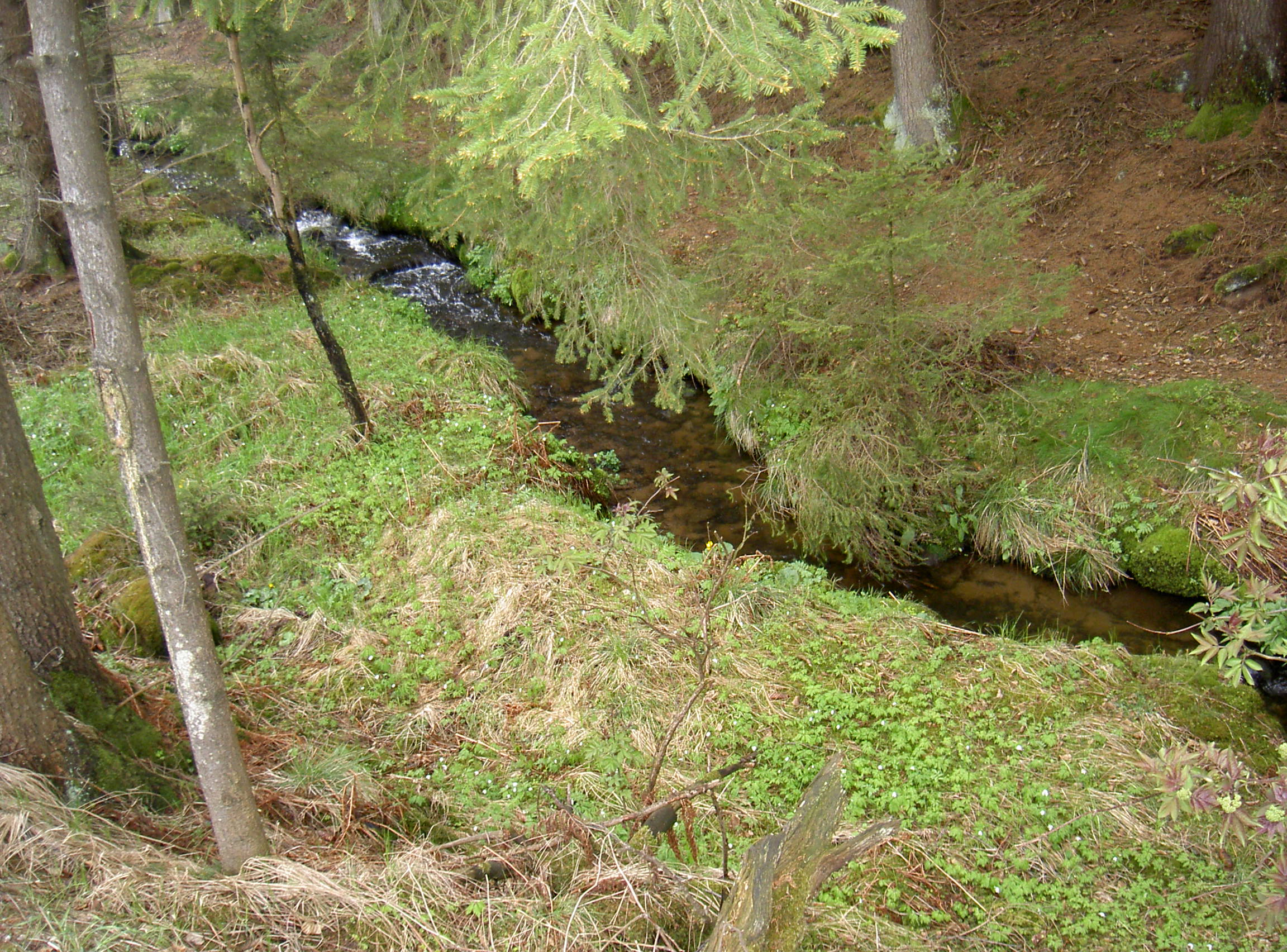 Mierbach - Fahrbach bei Lindau